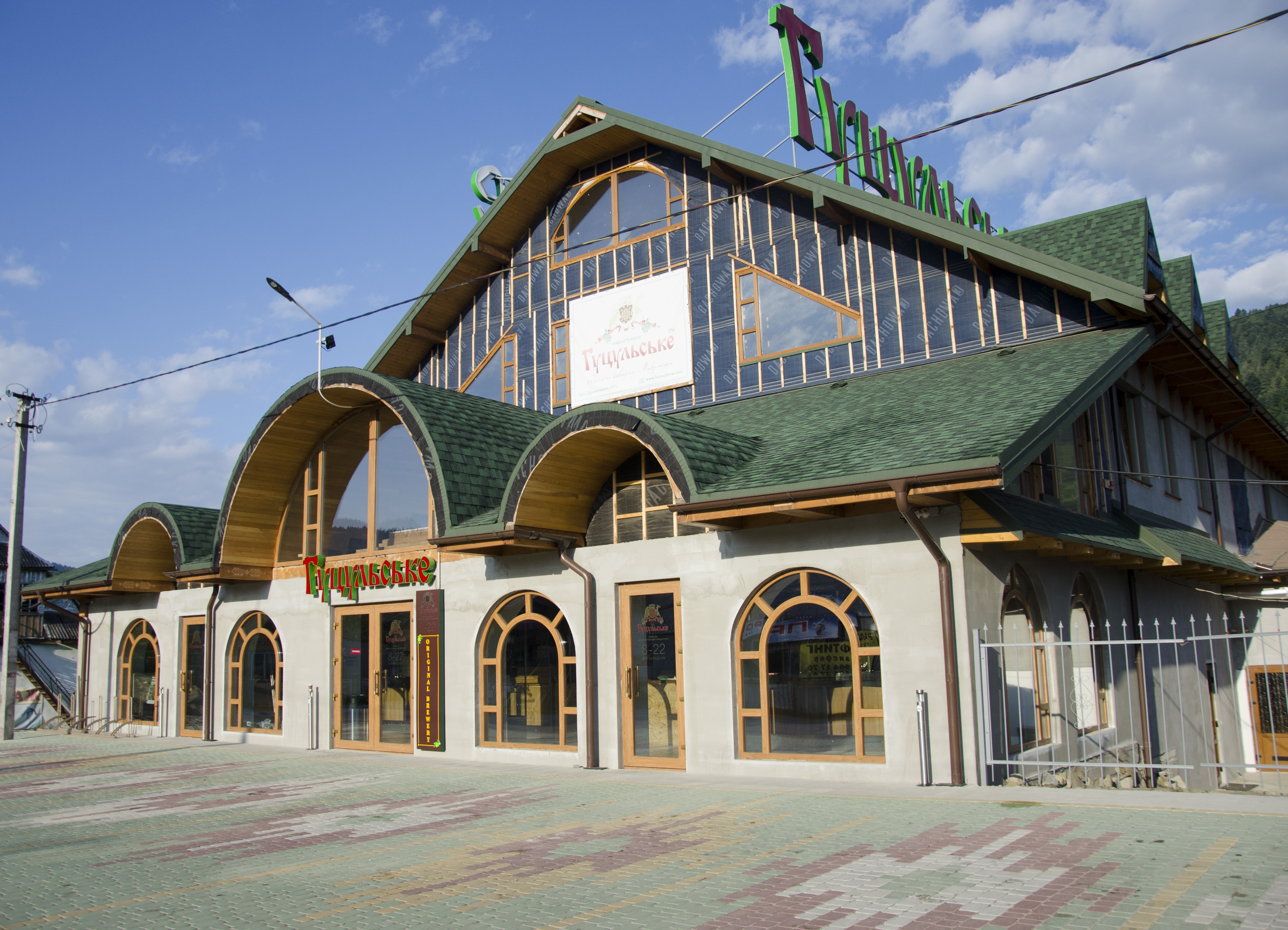 в 2019 році броварня "Микуличин" отримала оновлений фасад виробничого та торгівельного комплексів